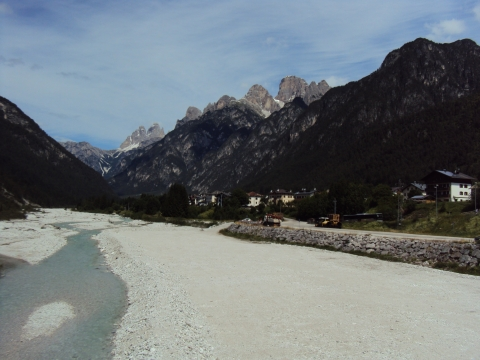 Val d'Ansiei